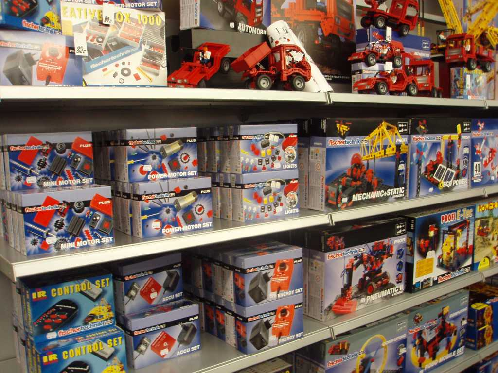 Fischershop, Waldachtal, Germany